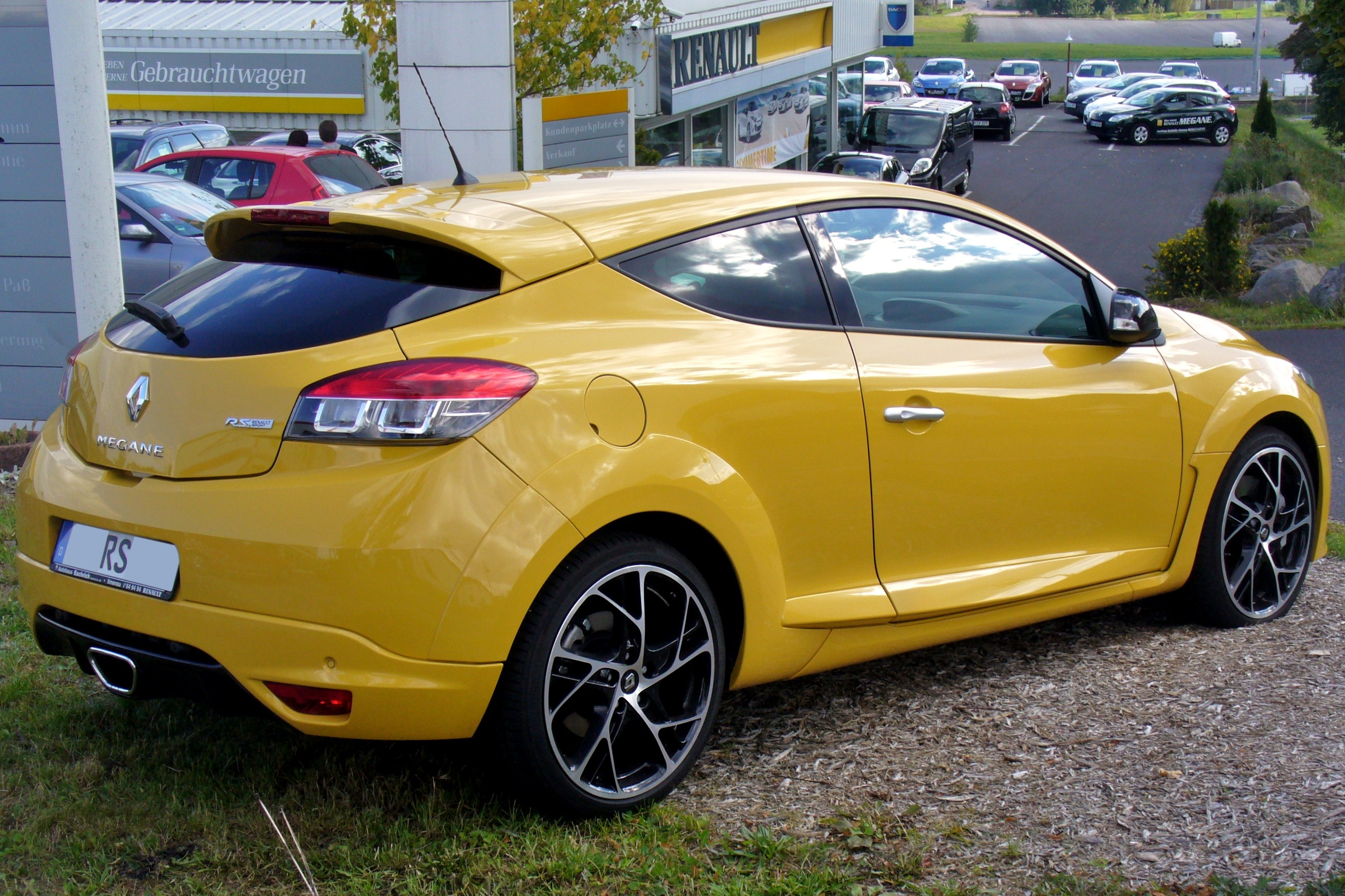 Renault Mégane III RS